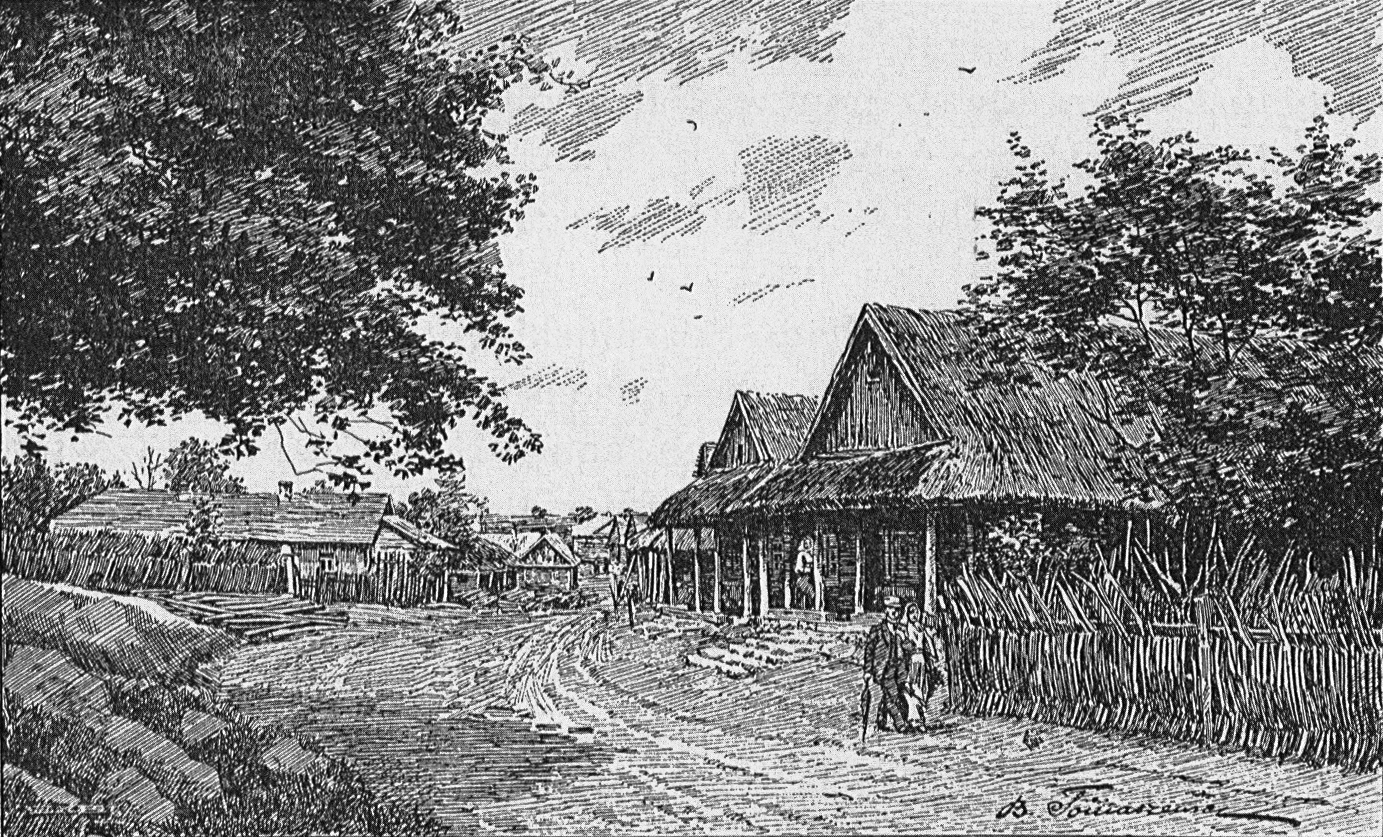 Беларуская (тарашкевіца): Трабы (Traby). Вуліца мястэчка